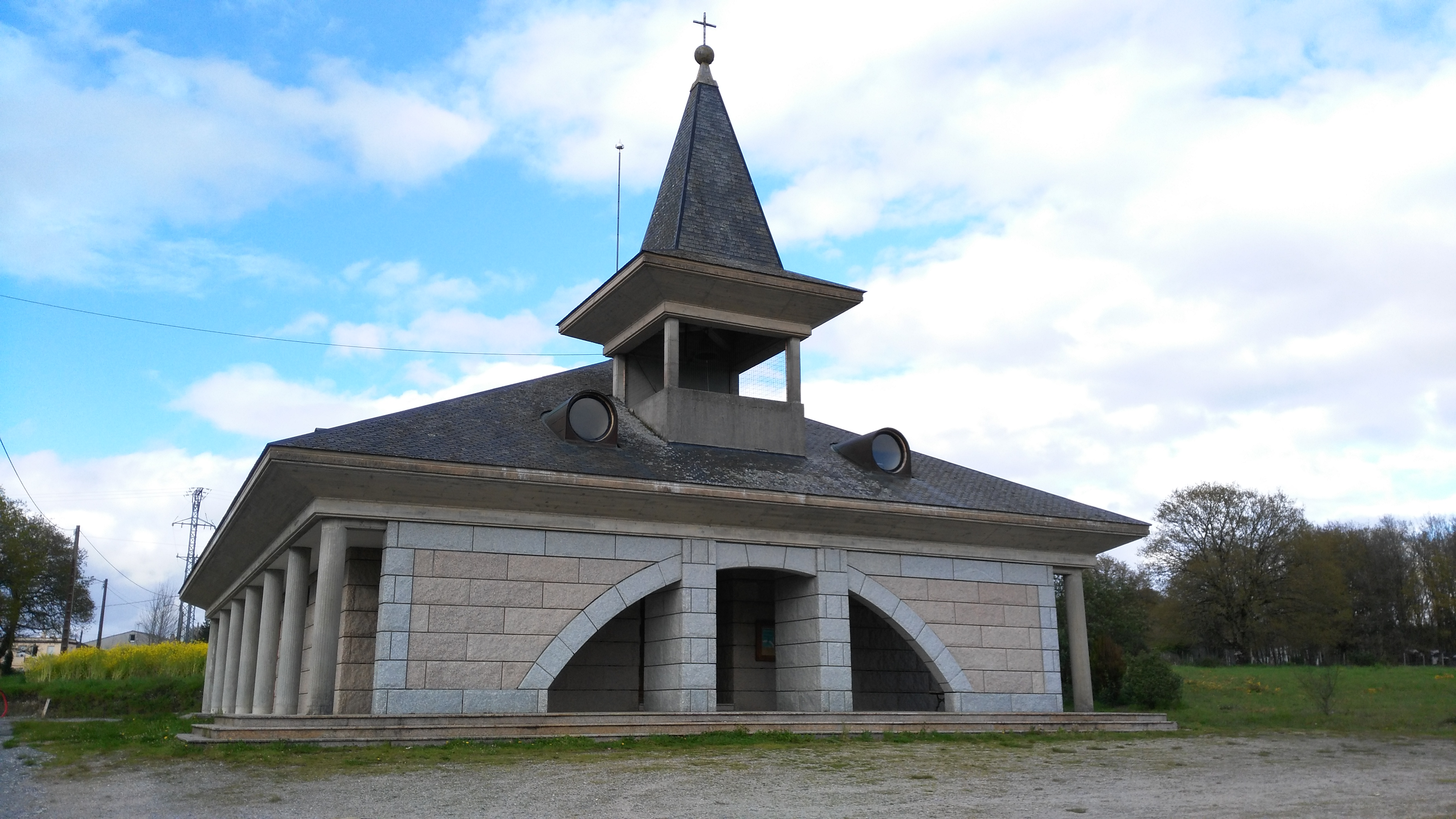 Igrexa parroquial de Muimenta, Cospeito